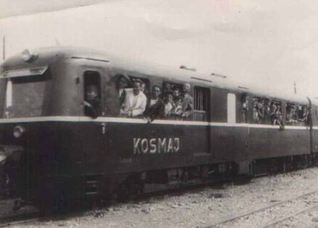 Nach dem Zweiten Krieg wurde die Dieseltriebzüge JDŽ 801 der Jugoslawischen Staatsbahnen repariert und mit einem roten Anstrich in Betrieb genommen.